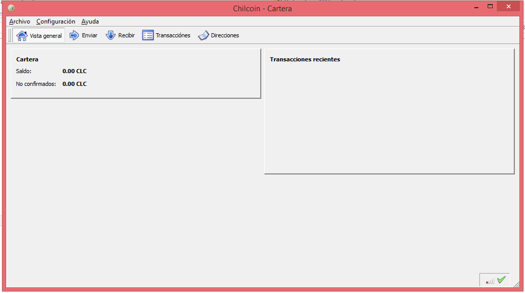 Vista de la Cartera de Chilcoin.